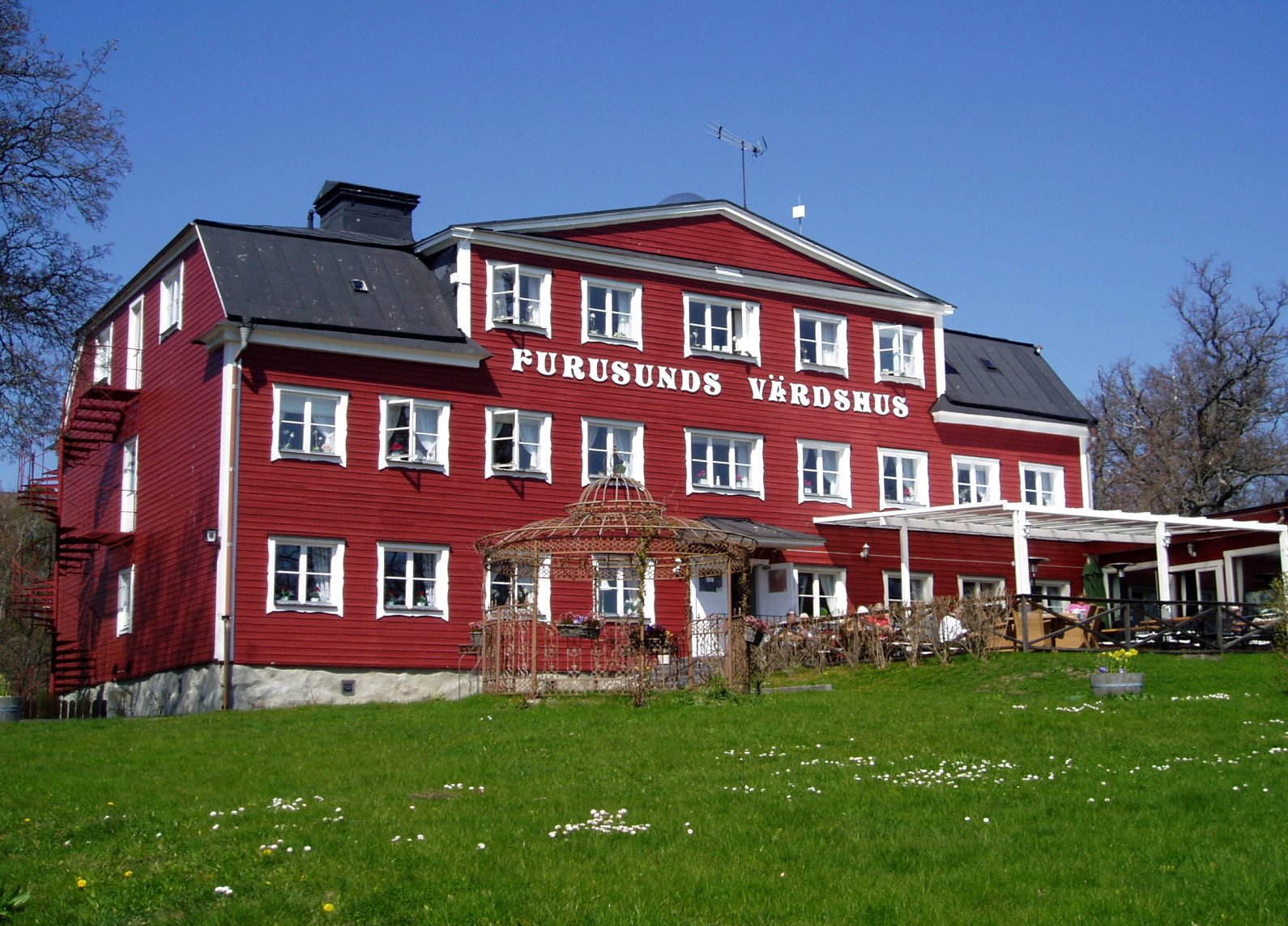 Furusunds värdshus